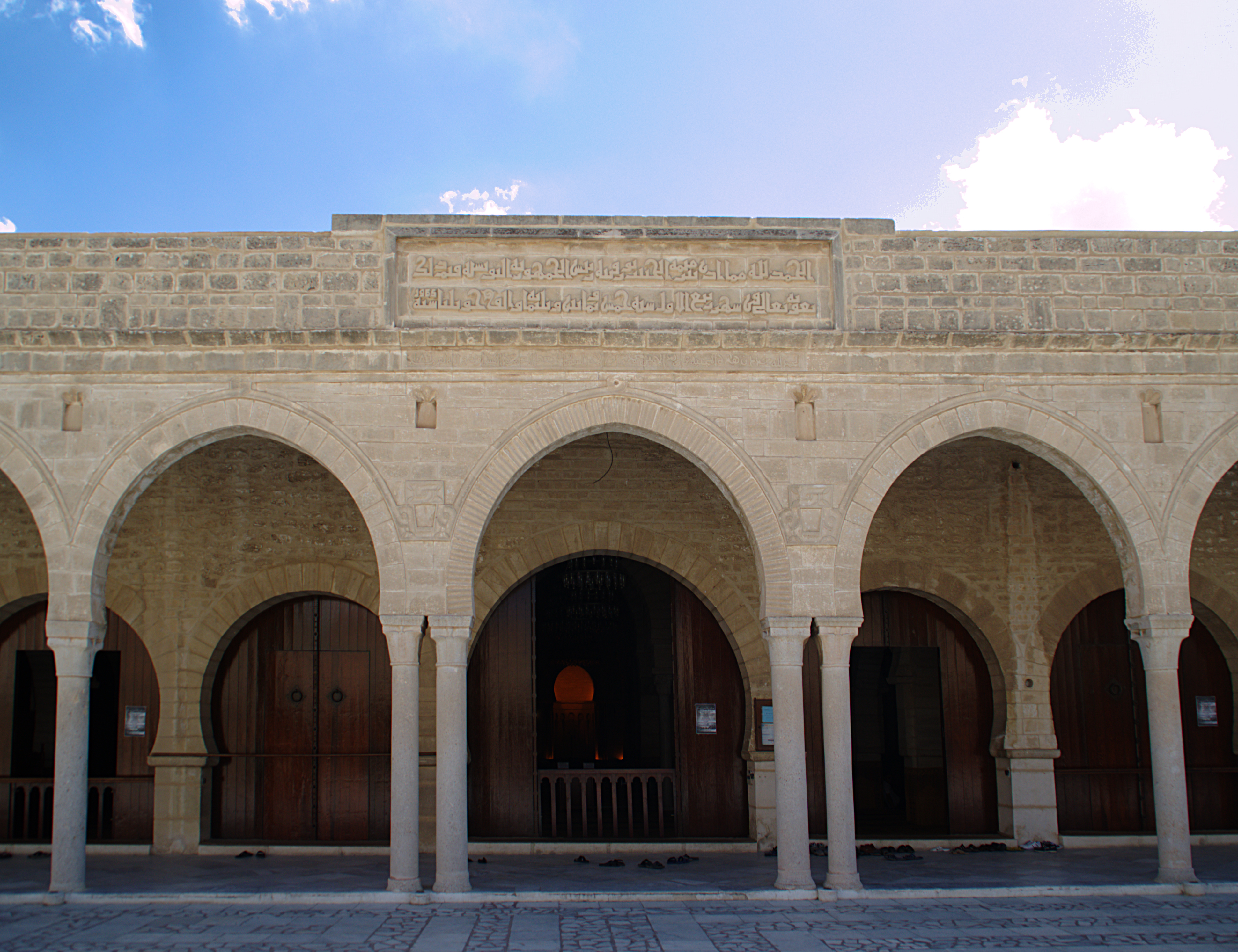 الحمد لله مما أذن بترميمه الحبيب بورقيبة رئيس الجمهورية التونسية فتم ذلك بعونه تعالى شهر ربيع الأول سنة خمس وثمانين ثلاثمائة وألف جويلية سنة 1965